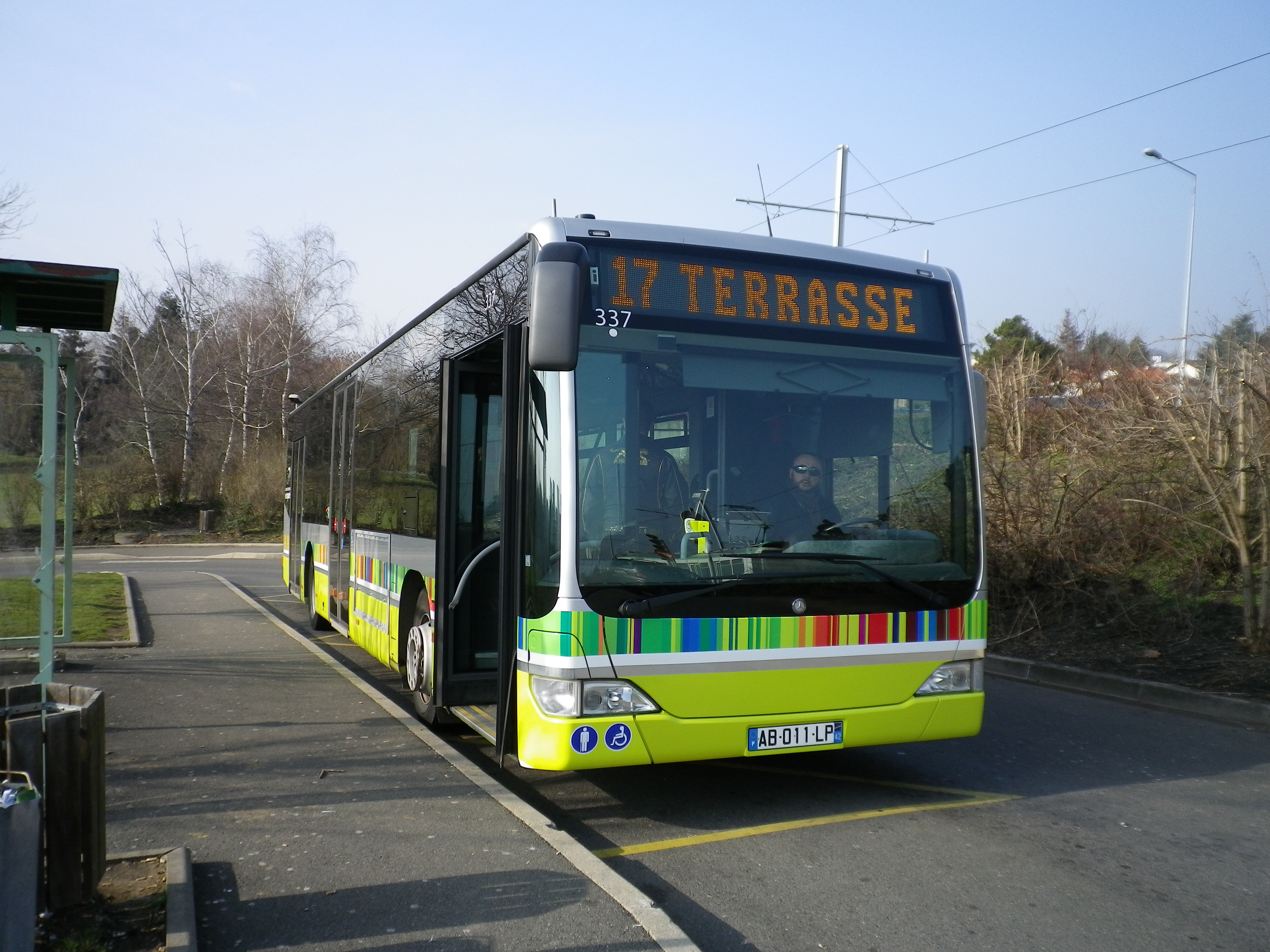 Un Mercedes Citaro sur la ligne 17 STAS à Saint-Priest-en-Jarez (42)Pentax Optio H90